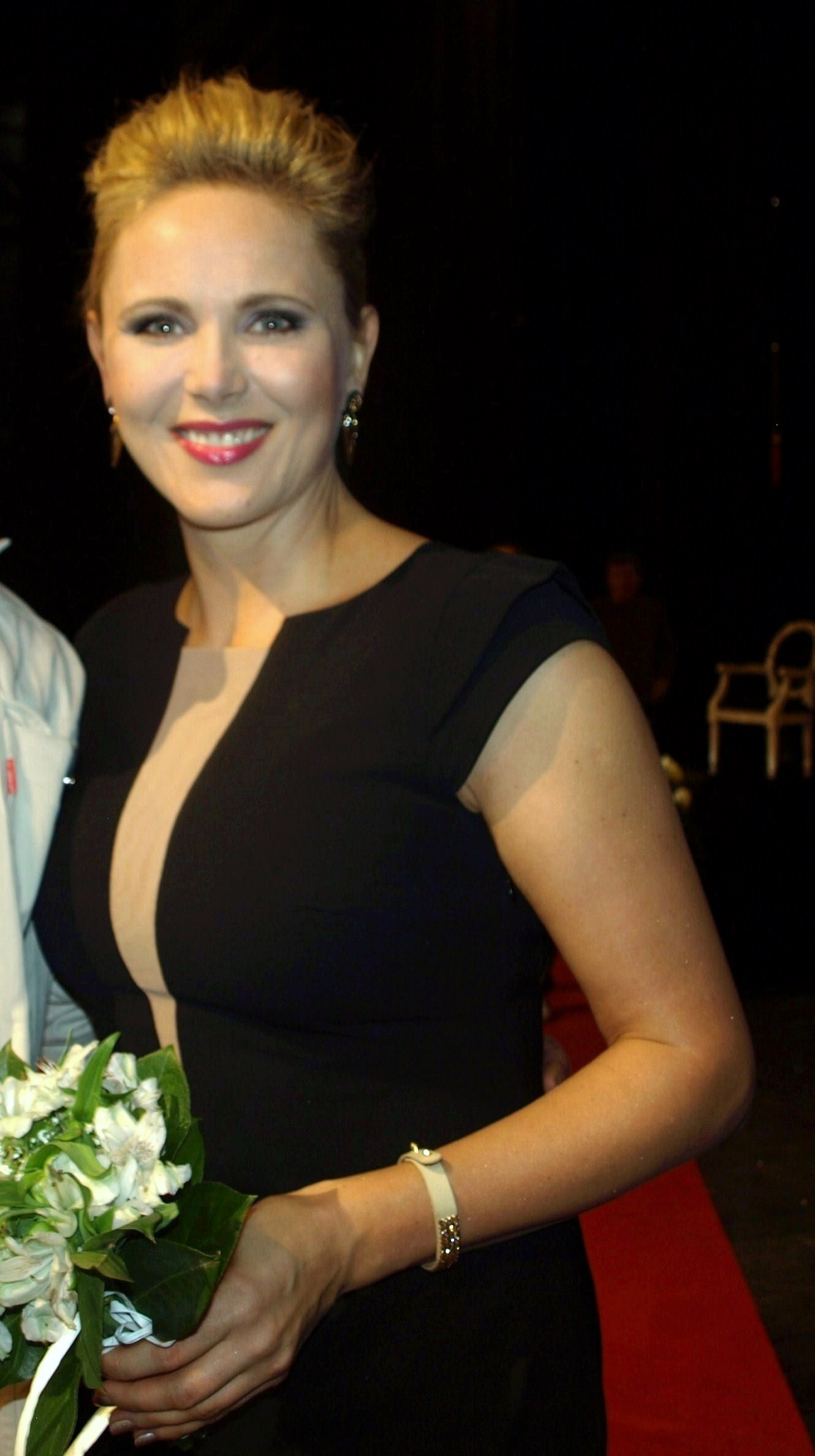 Anna Samusionek, aktorka.